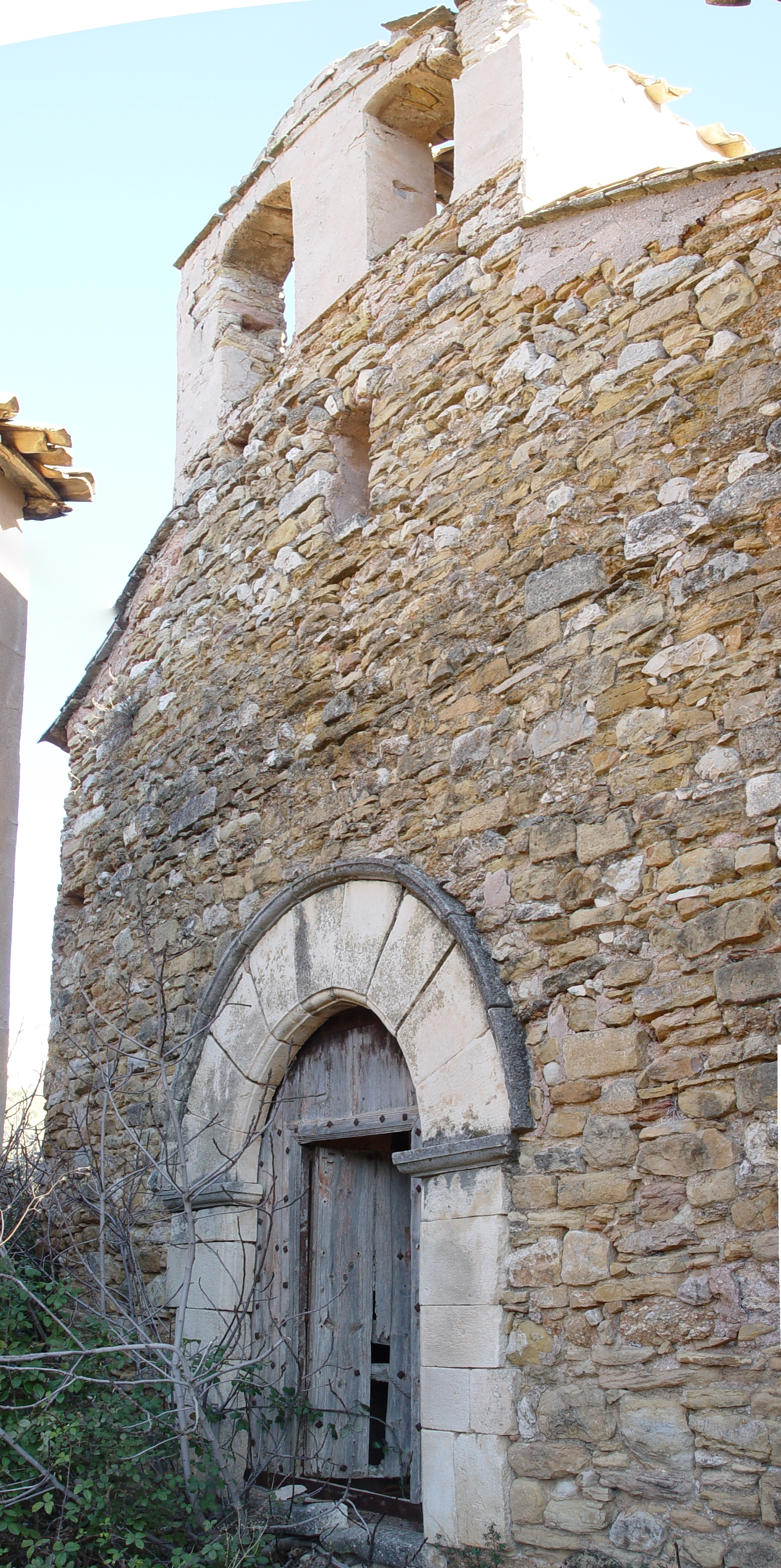 Església de Santa Maria de l'Estall